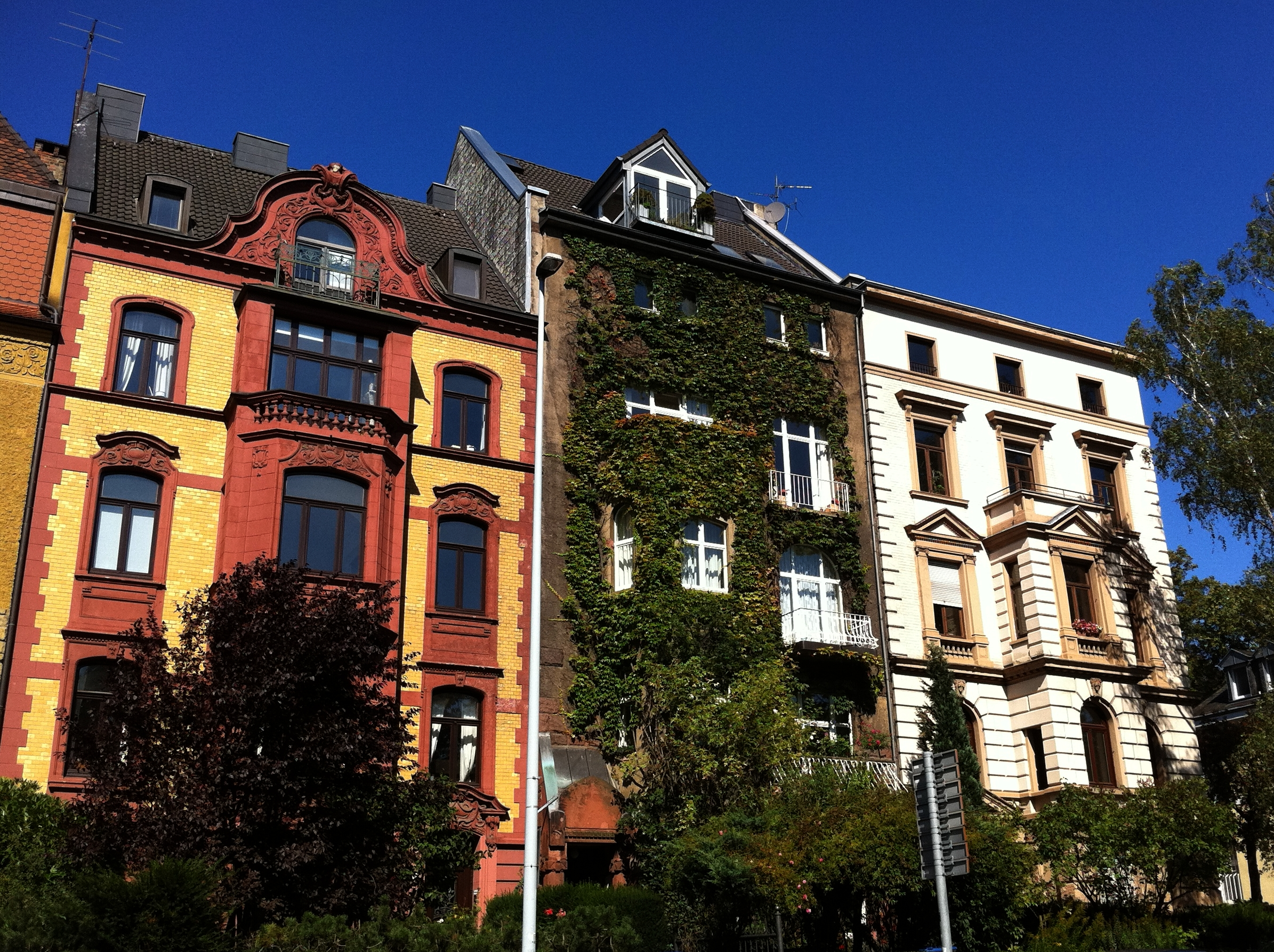 Die Häusergruppe Krefelder Straße 27-31. Haus Nr. 27 (links i. Bild) und Haus Nr. 31 (rechts i. Bild) wurden von Arnold Königs erbaut.